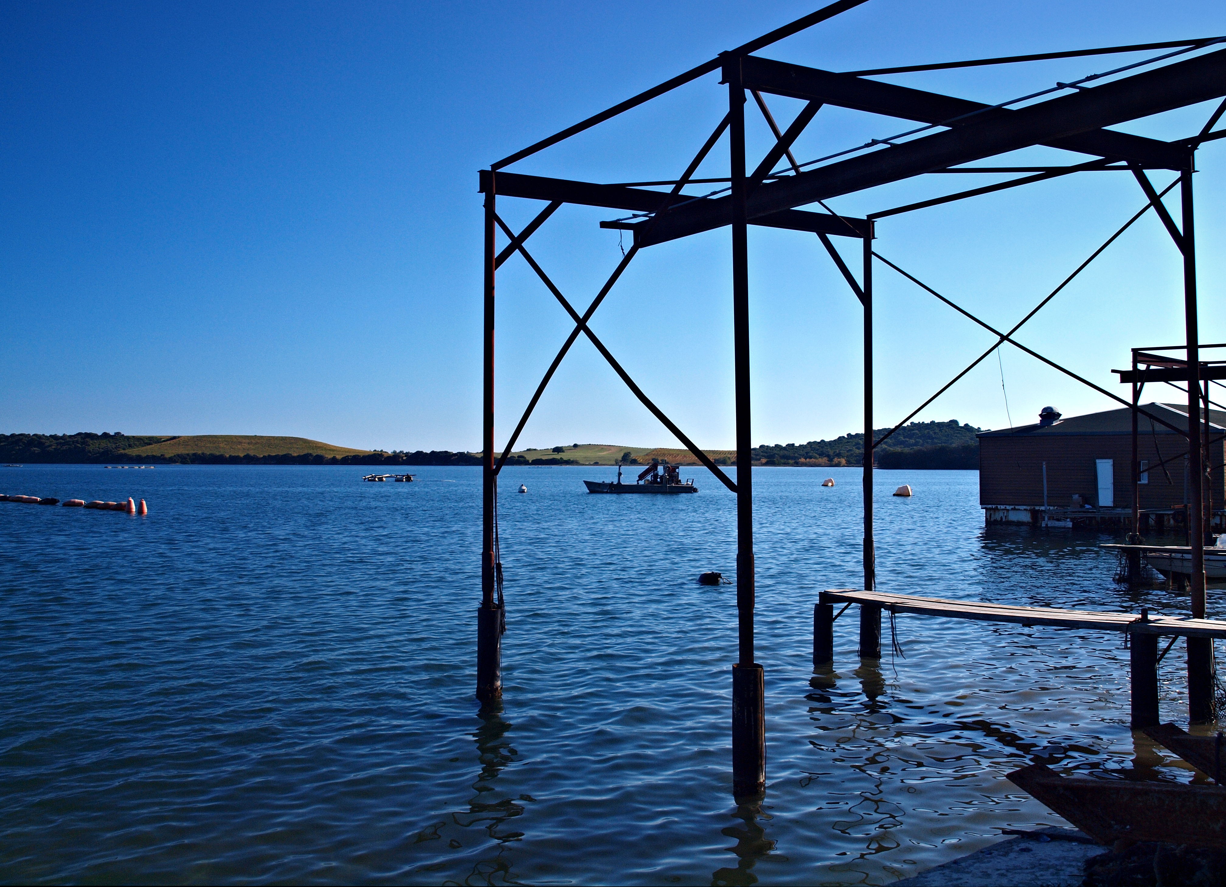 Aléria (Corsica) - Une structure professionnelle de déchargement de l'étang de Diana